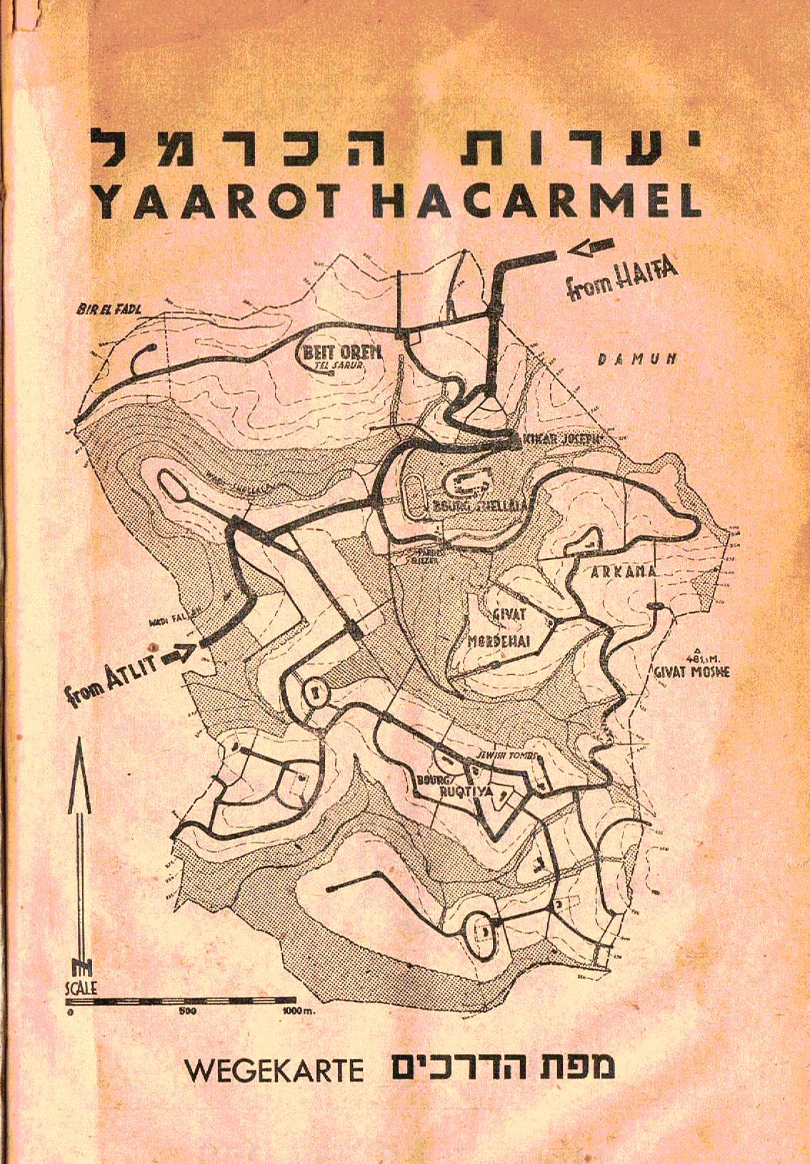 Yaarot Hacarmel Settlers Assocatoin Ltd brochure חוברת הפרסום של תכנית יערות הכרמל להקמת יישוב בהר הכרמל באזור חוות משמר הכרמל, גבעת וולפסון קיבוץ בית אורן של היום. פעילות שהחלה בשנות השלושים של המאה העשרים. החוברת כללה פרסום בעברית ובגרמנית